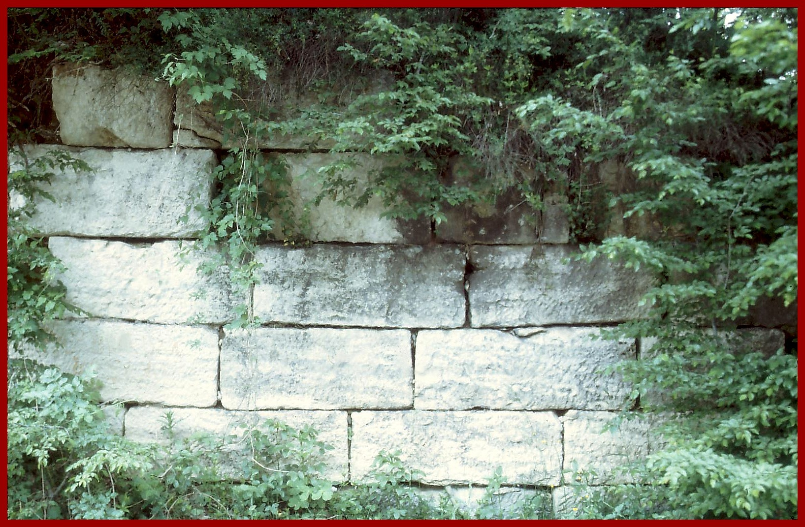 Innenseite der Anastasiusmauer im Nordteil bei Karacaköy